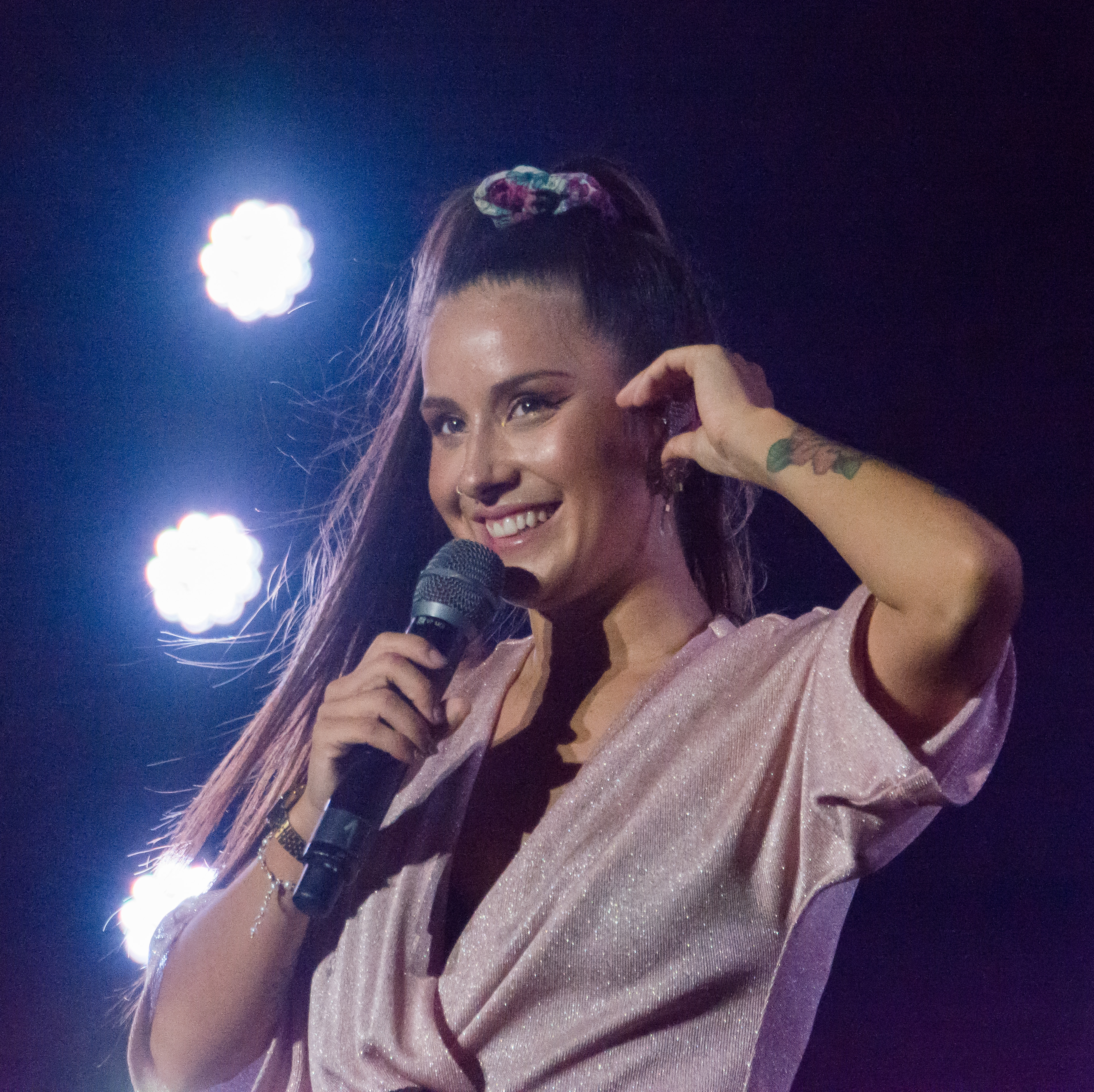 Expo Quillota 2020, Estadio Municipal Lucio Fariña Fernández, Quillota, Región de Valparaíso, Chile